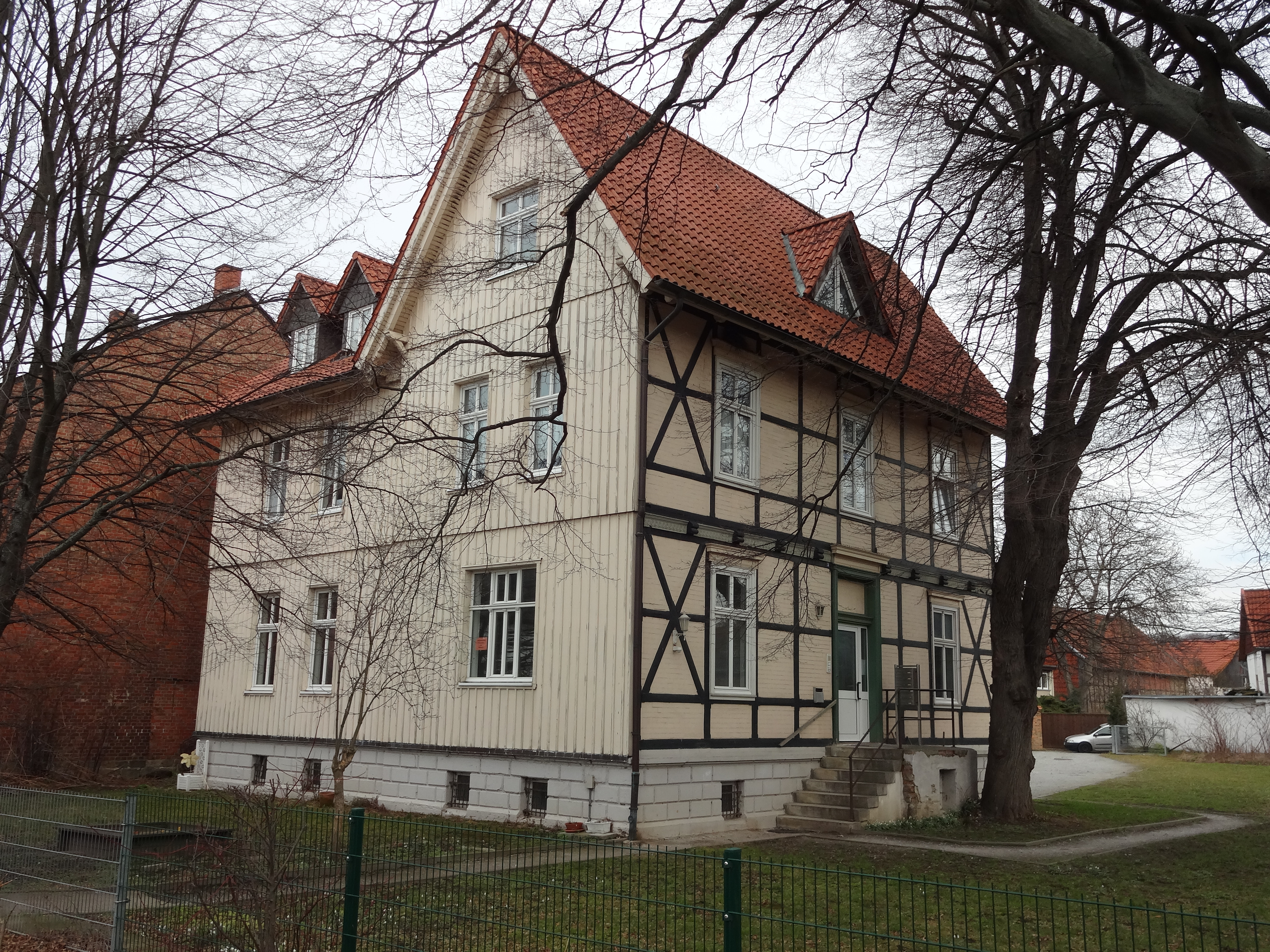 ehemals denkmalgeschütztes Wohnhaus in der Promenade 3 in Derenburg, Ortsteil von Blankenburg (Harz)